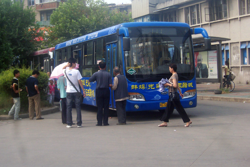 中文（中国大陆）: Bengbu Bus No.111 Old